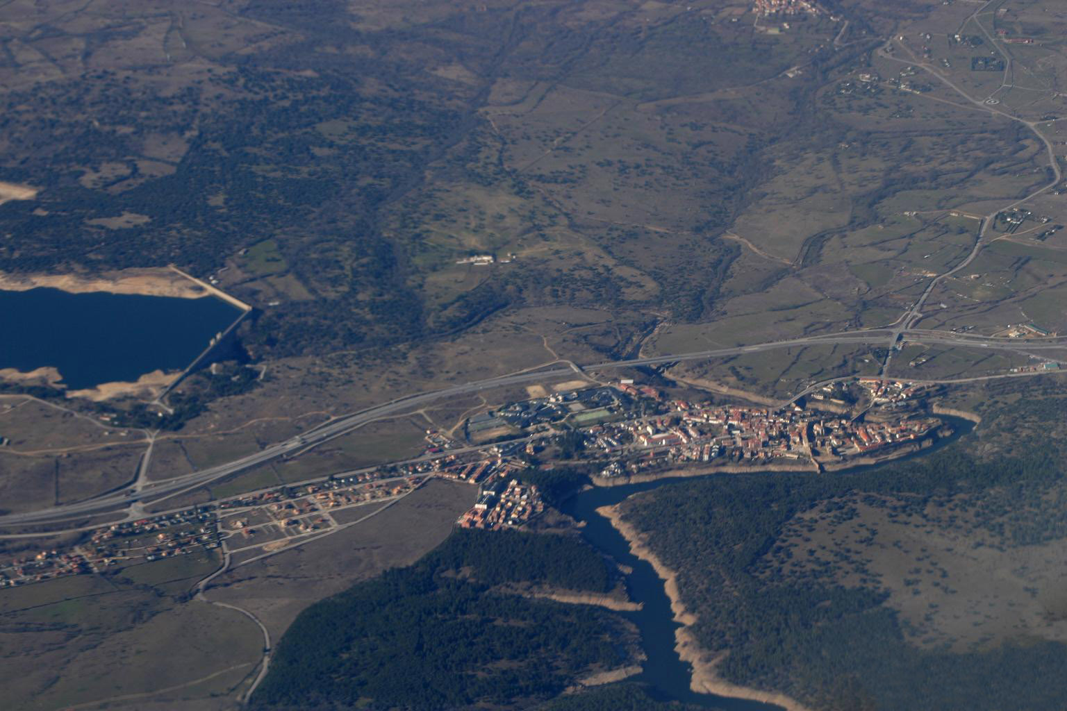 Buitrago del Lozoya, rodeado por los embalses de Riosequillo y Puentes Viejas